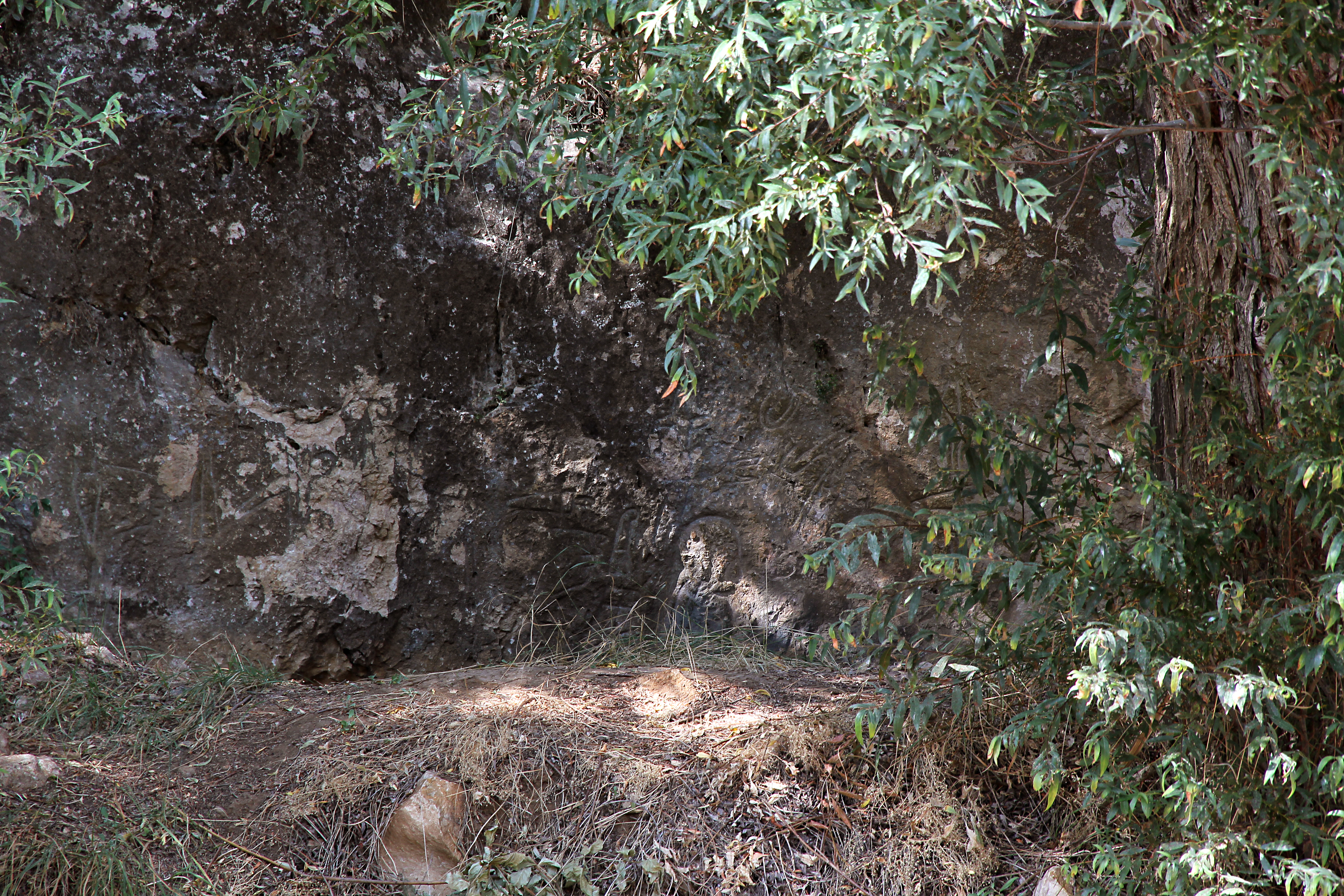 Taşçı A, hethitisches Felsrelief nahe Develi, Zentraltürkei